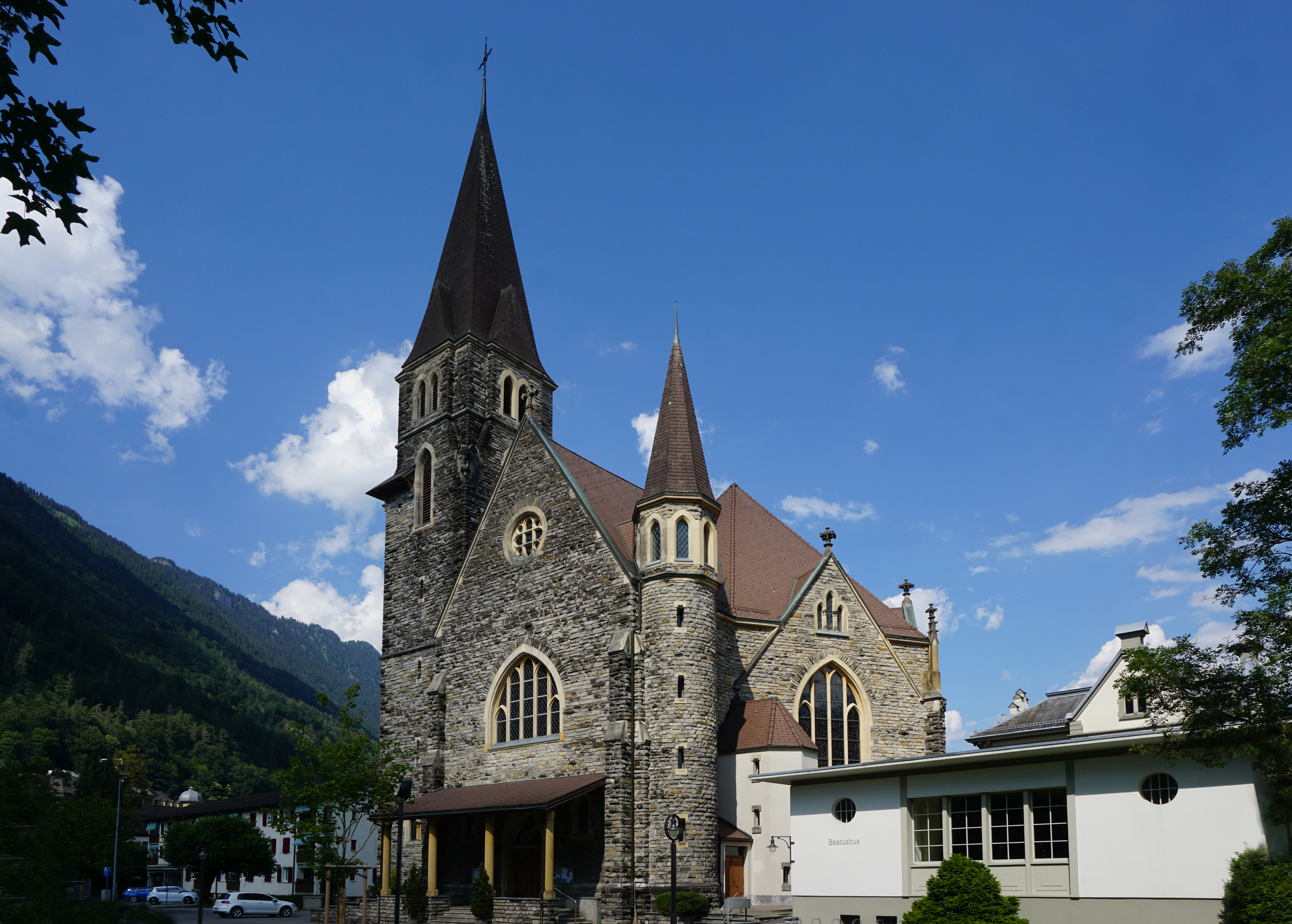 Heiliggeist Kirche mit Beatushus